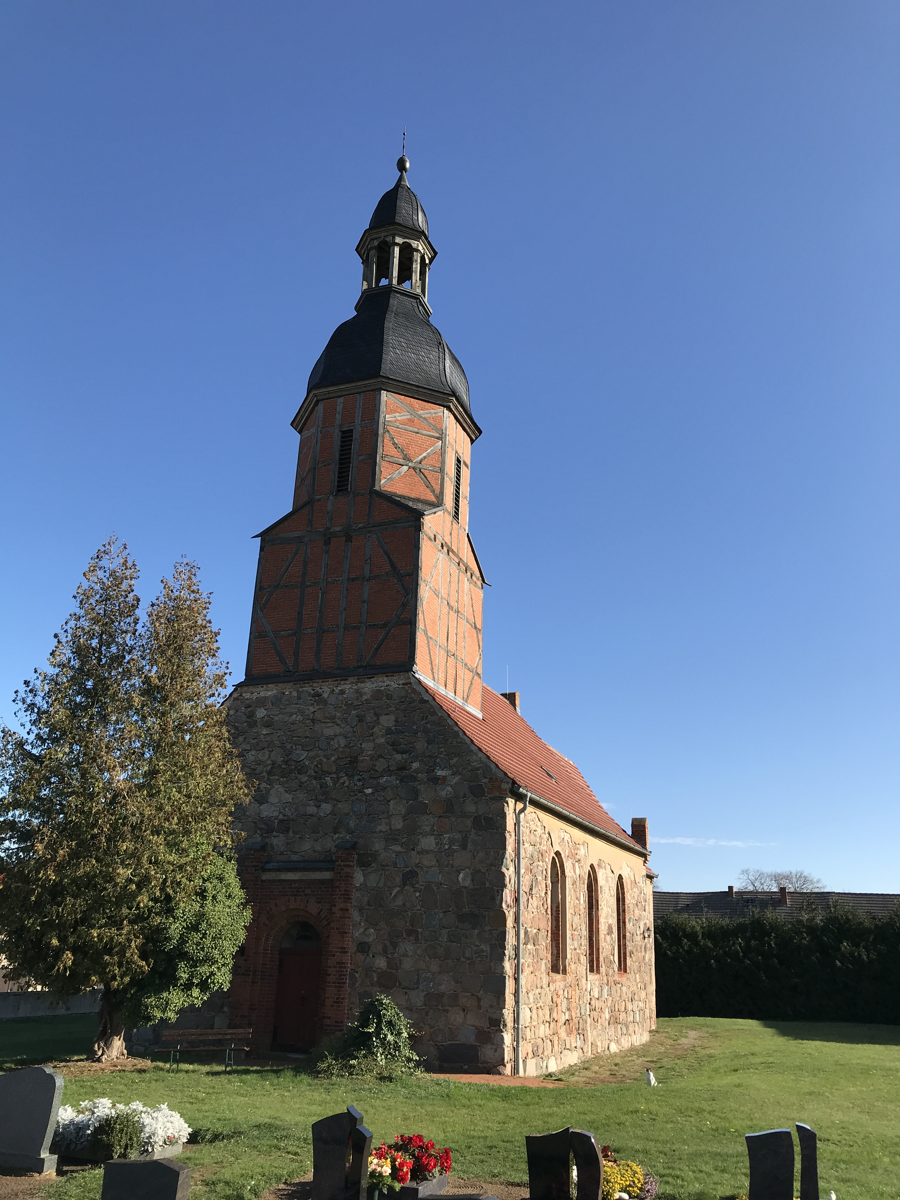 Die Dorfkirche Welsickendorf in der Gemeinde Niederer Fläming im Landkreis Teltow Fläming ist eine Feldsteinkirche aus dem 13. oder 14. Jahrhundert. Im Innern steht unter anderem ein breiter Altaraufsatz aus dem Jahr 1692.